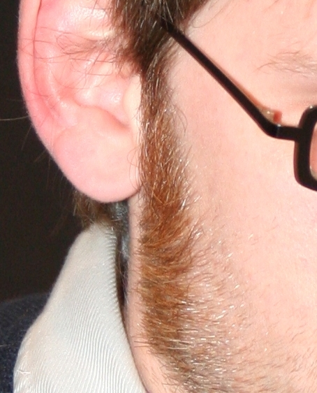 auteur de bande dessinée, lors du salon Quai des Bulles à Saint-Malo, France, en octobre 2008